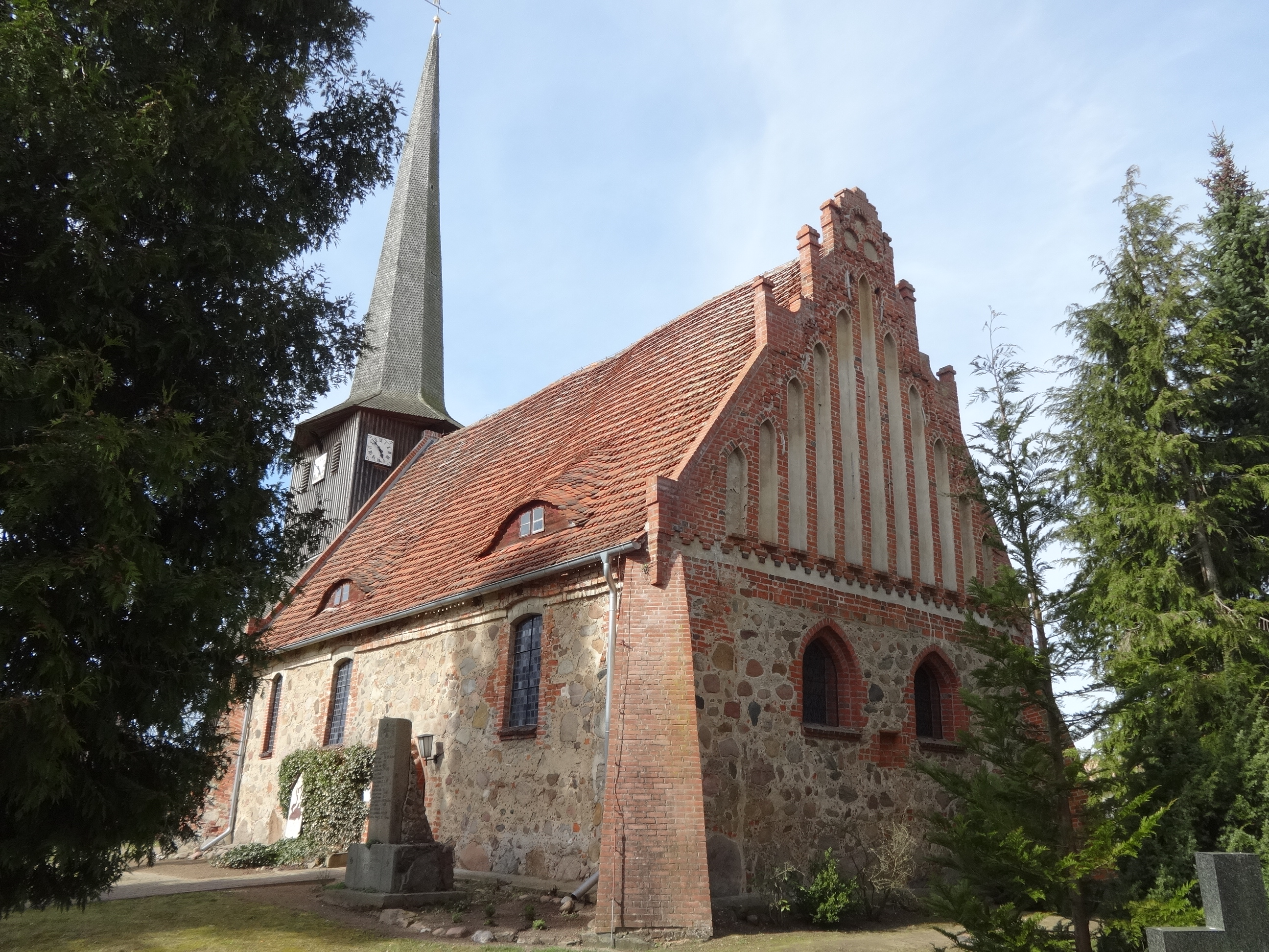 Die Dorfkirche in Suckow ist eine Saalkirche im Landkreis Ludwigslust-Parchim, die vermutlich im 14. Jahrhundert errichtet wurde. In seinem Innern ist ein neugotisches Altarretabel aus dem Jahr 1867